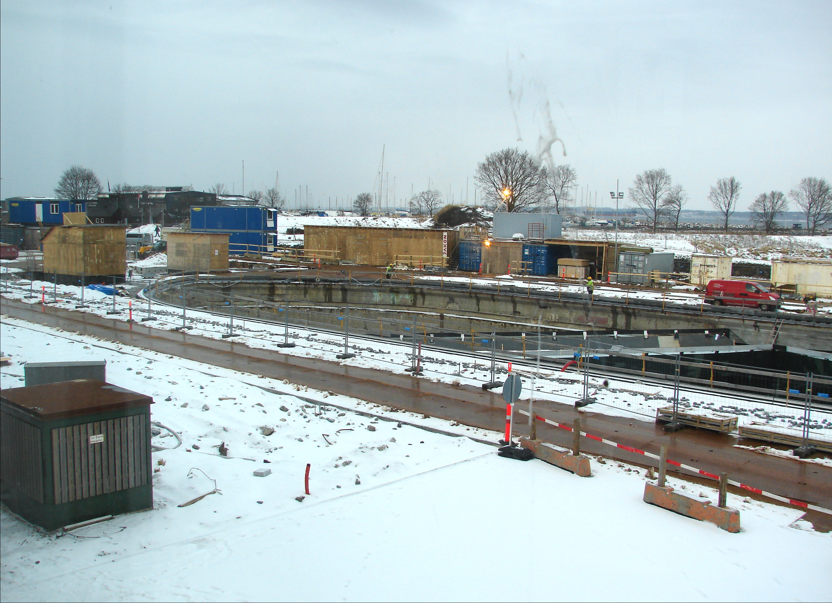 Søfartsmuséet i Helsingør under konstruktion, Helsingør, Sjælland